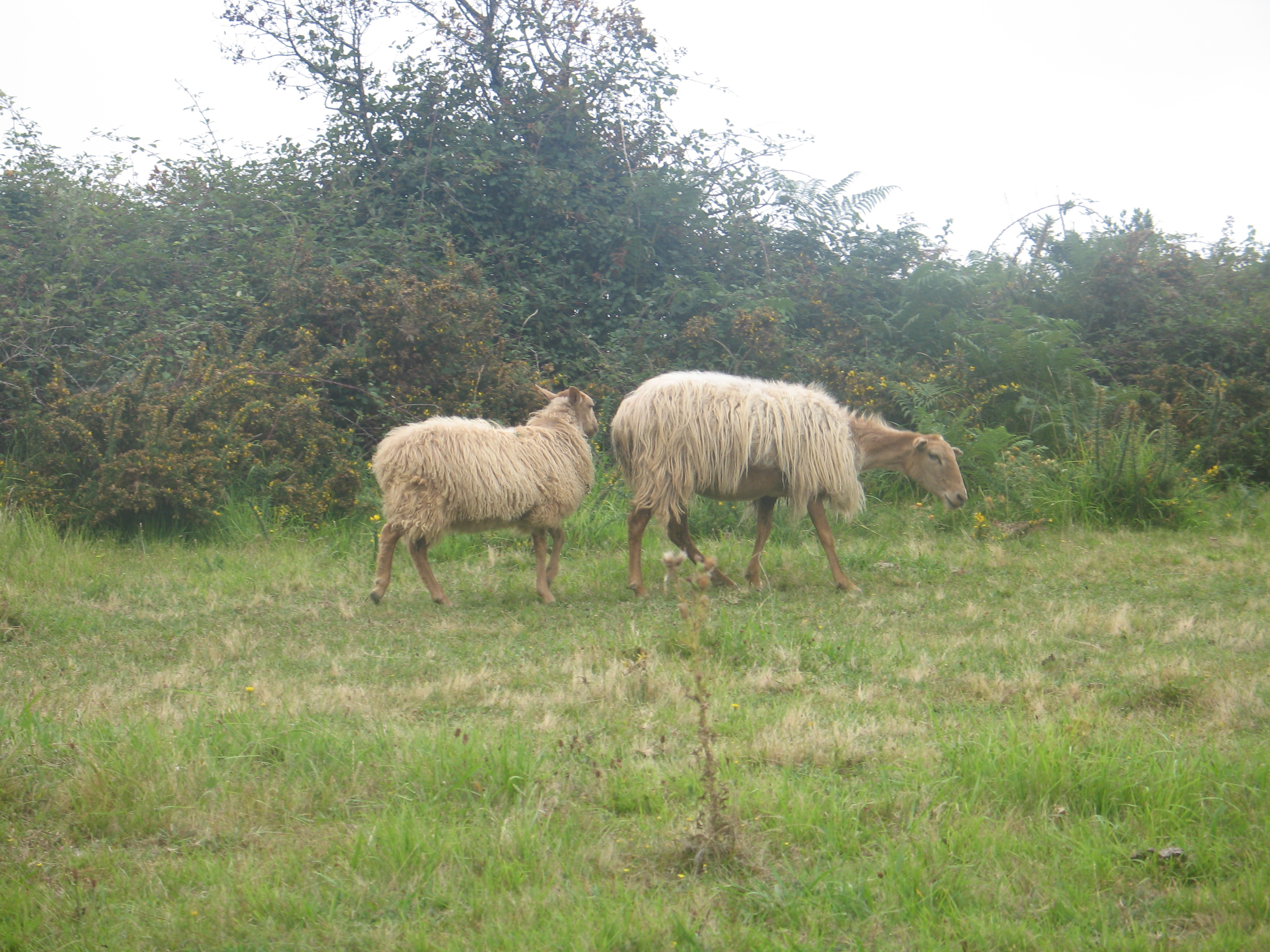 Sasardia arrazako ardiak